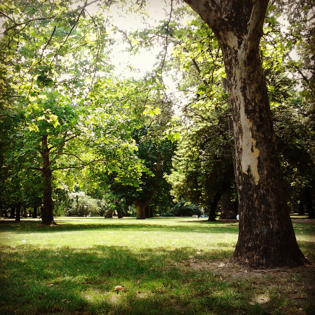 A Városliget Budapesten (XIV. ker.)